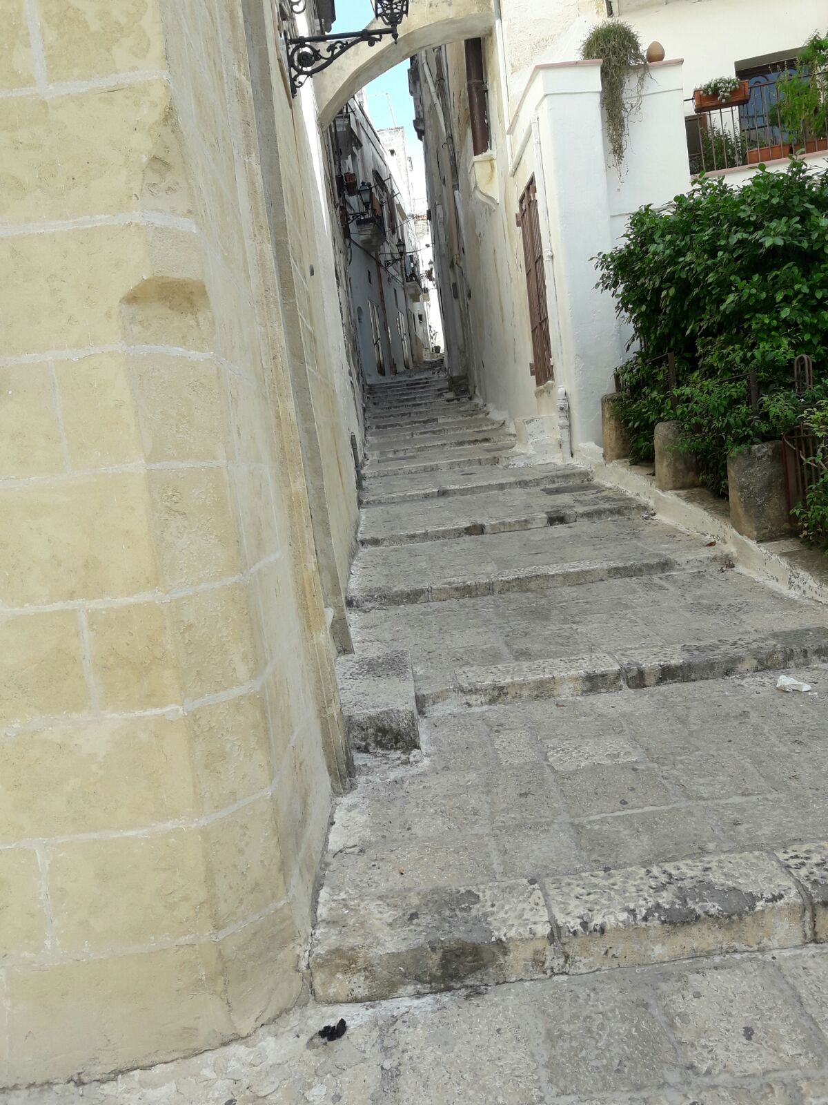 Paesaggio caratteristico del centro storico grottagliese